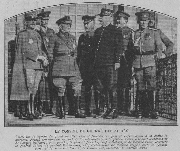 Le Pays de France N°61 page 2_les généraux Joffre French Jilinsky Porro et Wiellemans.